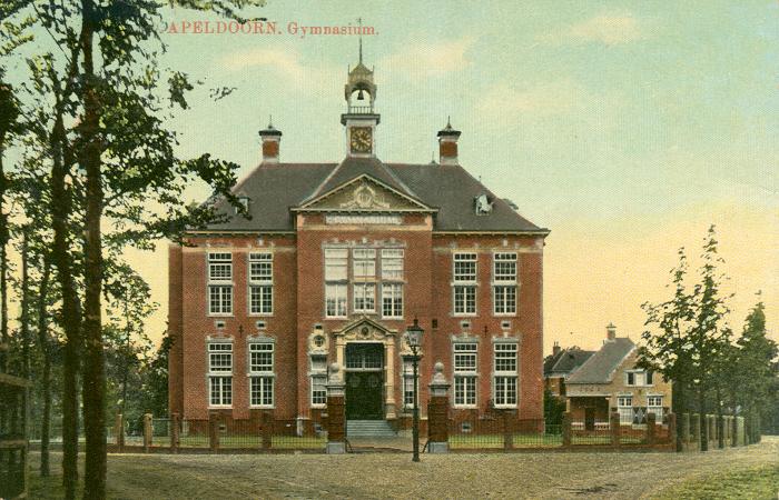 The main building of the Gymnasium Apeldoorn.